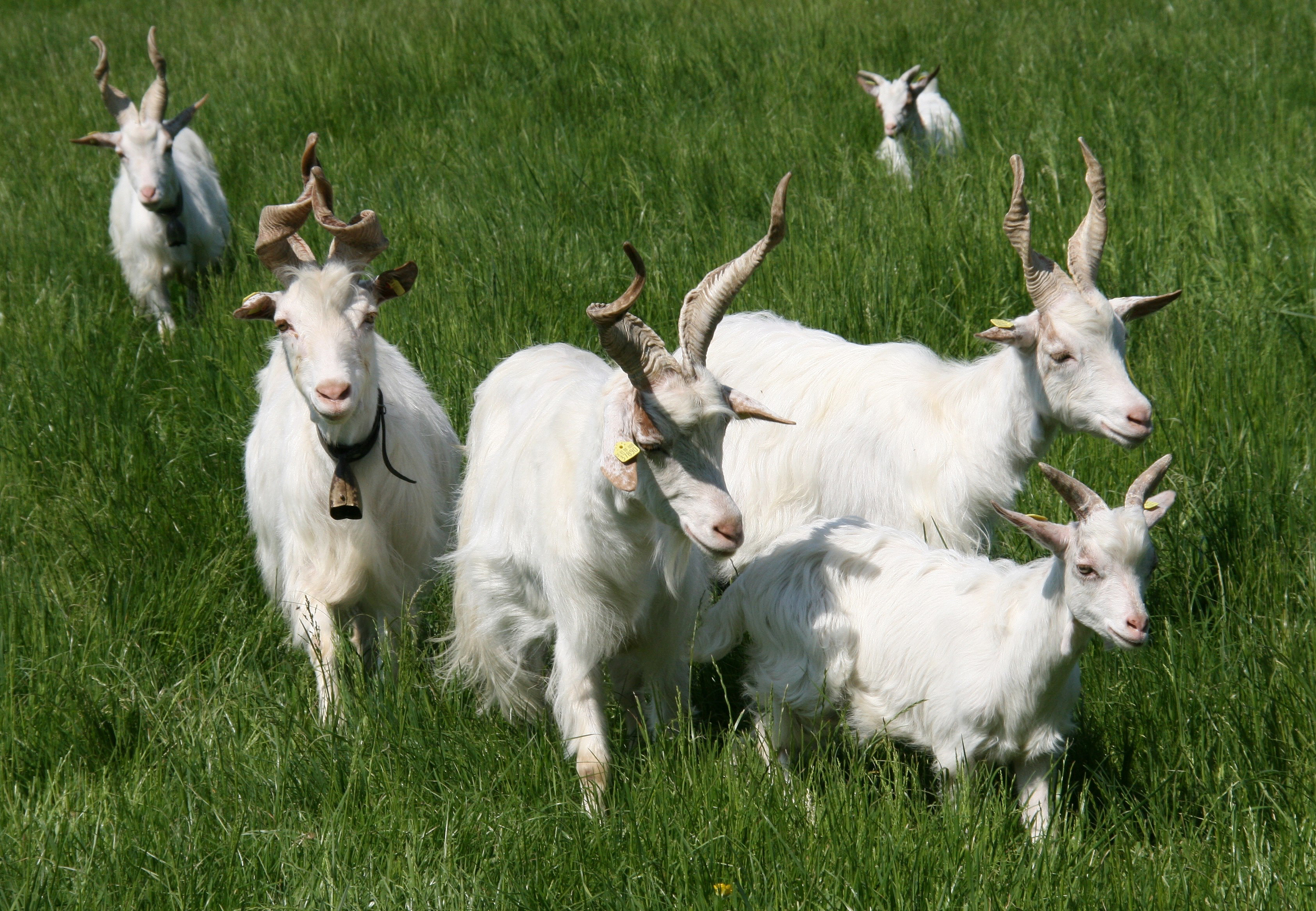 Die Girgentana-Ziege stammt ursprünglich aus der italienischen Provinz Agrigento (Sizilien). Die Stadt Agrigento hieß bis 1929 Girgenti, nach ihr ist diese Hausziegenrasse benannt.